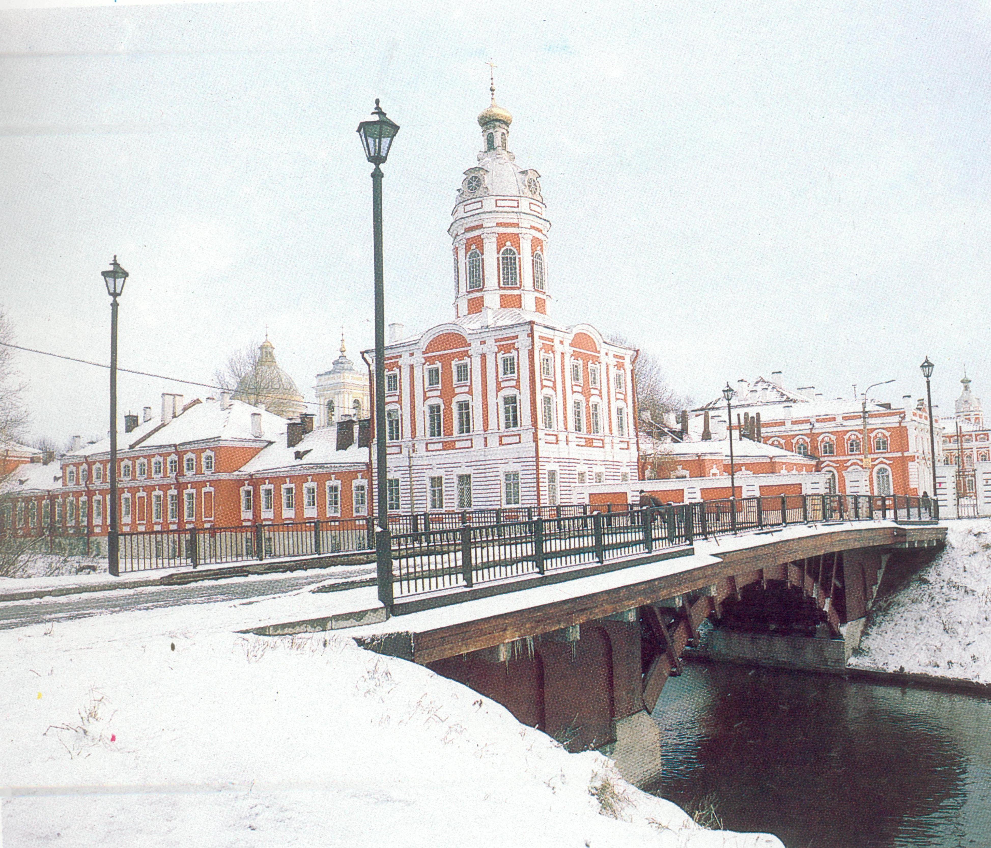 Монастырка, Александро-Невская Лавра, 2-й Лаврский мост, СПб